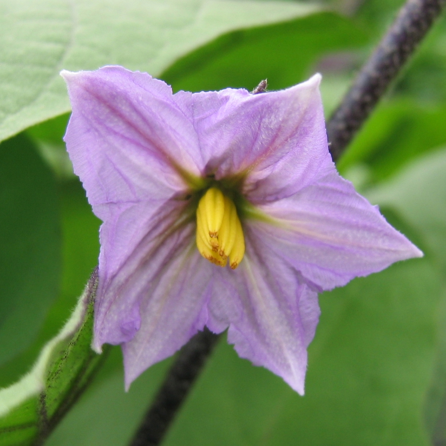 2006年8月15日、利用者自身の撮影、編集。